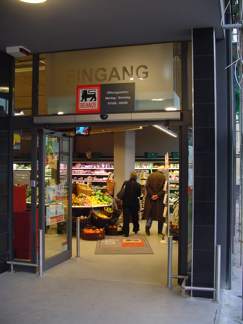 Ehemaliger Delhaize Supermarkt, Köln Innenstadt, jetzt REWE City